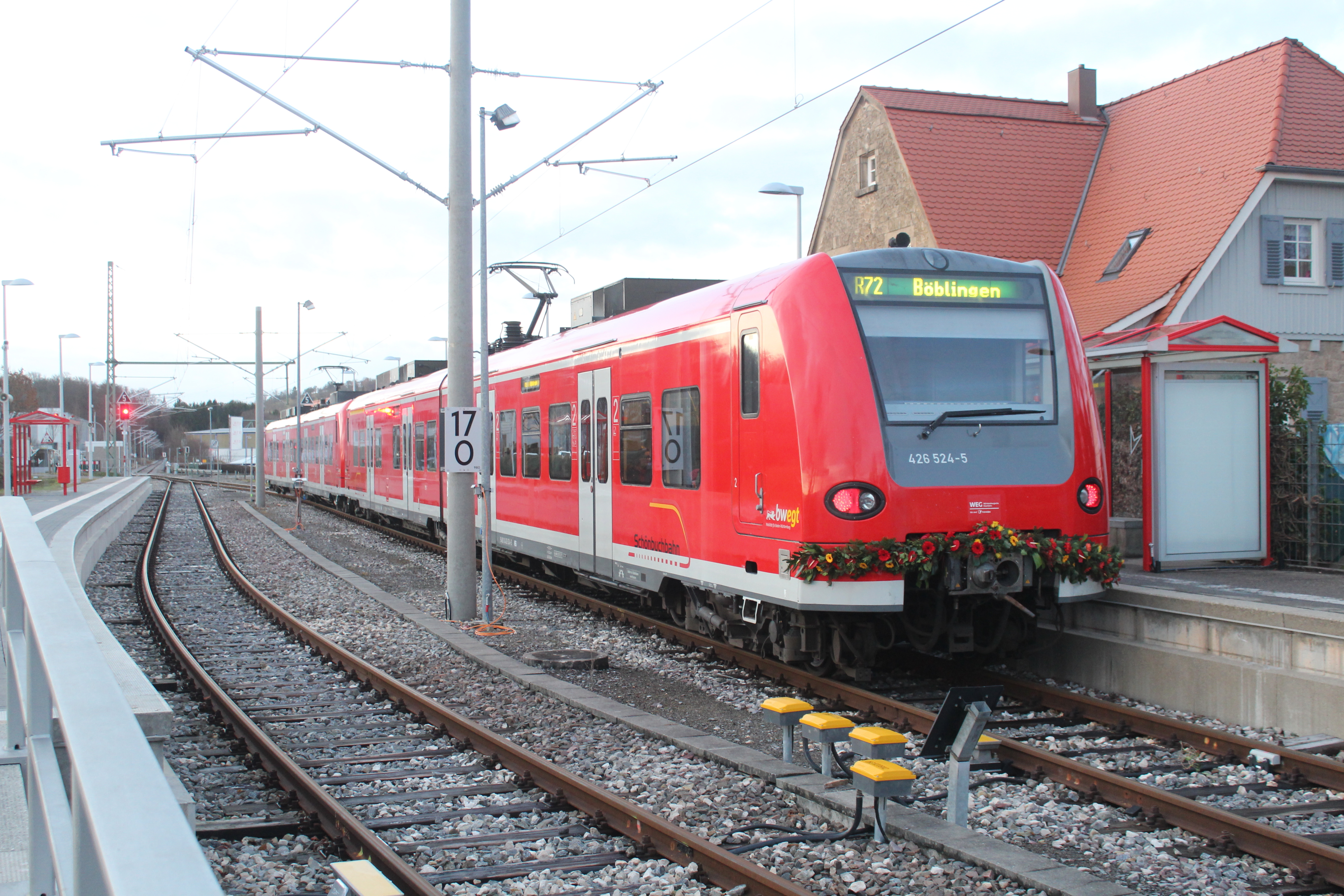 Elektrotriebwagen der Baureihe 426 im Bahnhof Dettenhausen